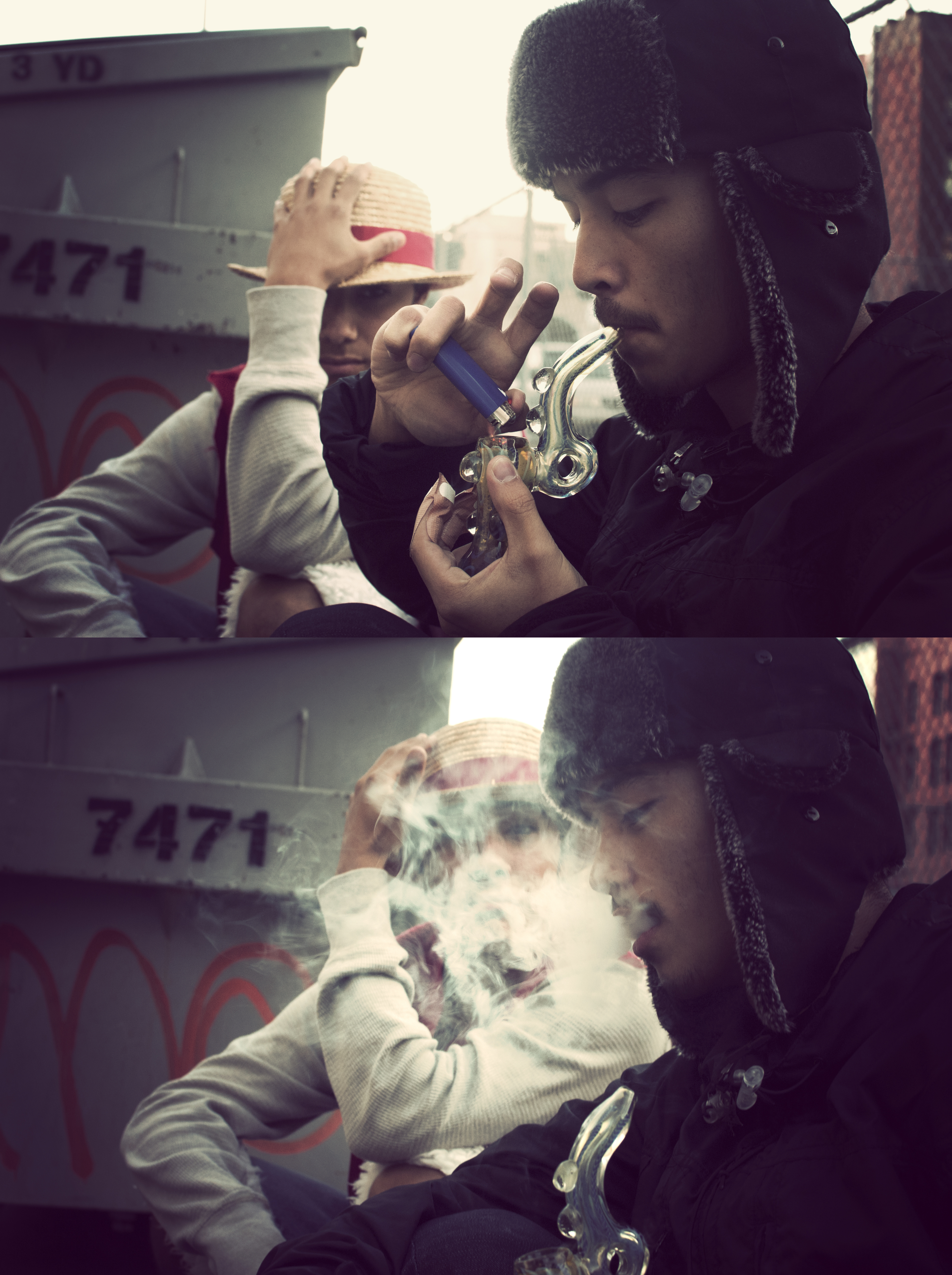 Young man smoking cannabis